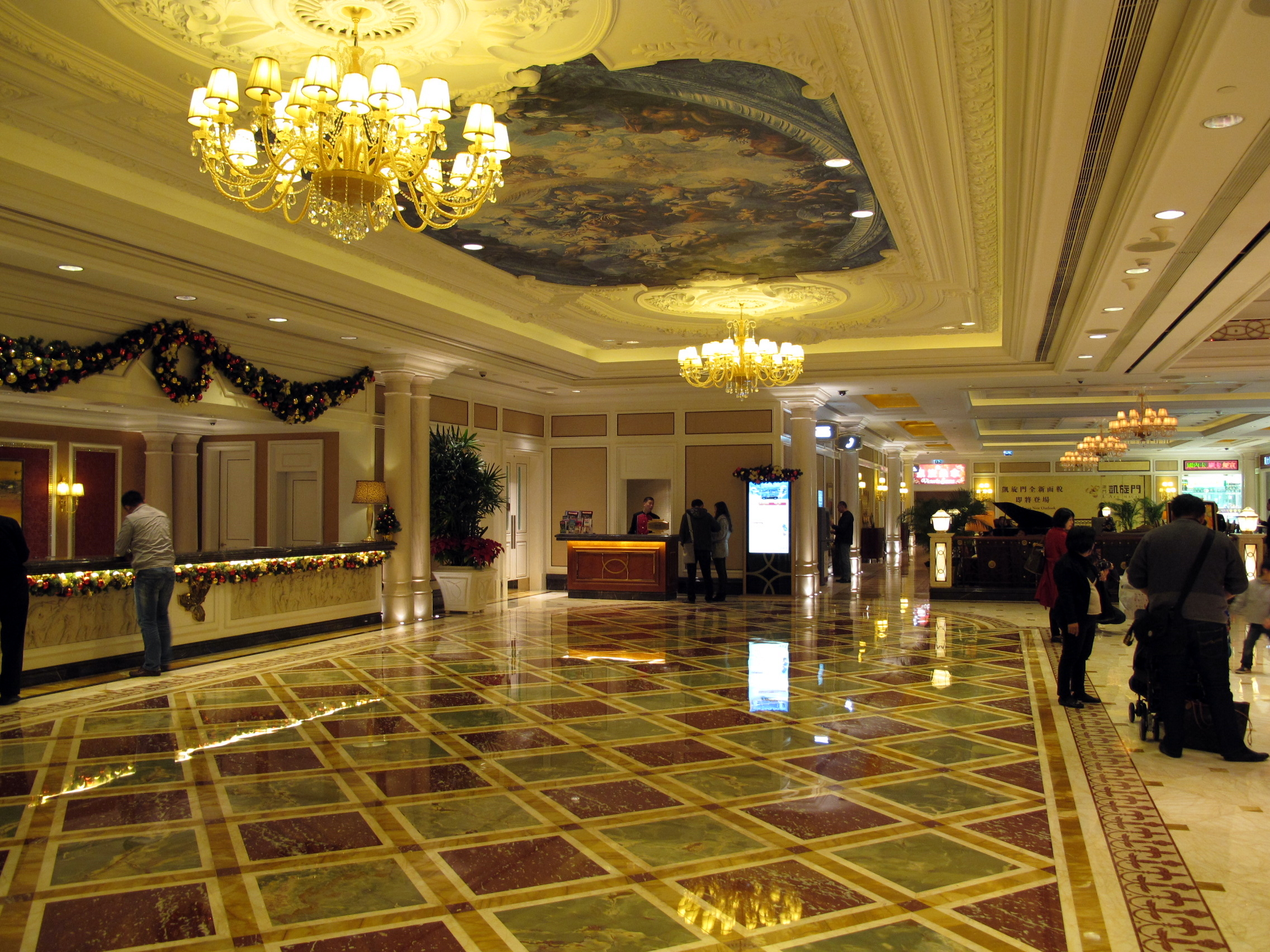 Larc Macau Lobby